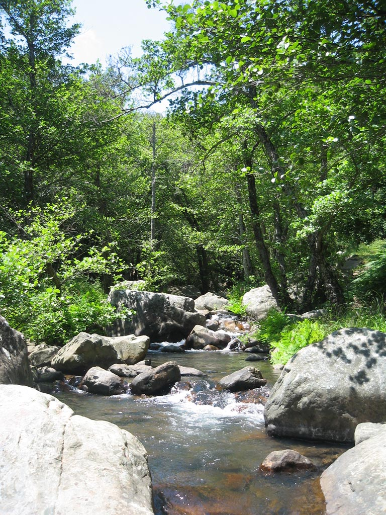 Río de la Miel, en Algeciras, Andalucia, España / Andalusia, Spain